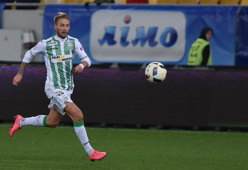 Костянтин Ярошенко - футболіст Карпат.